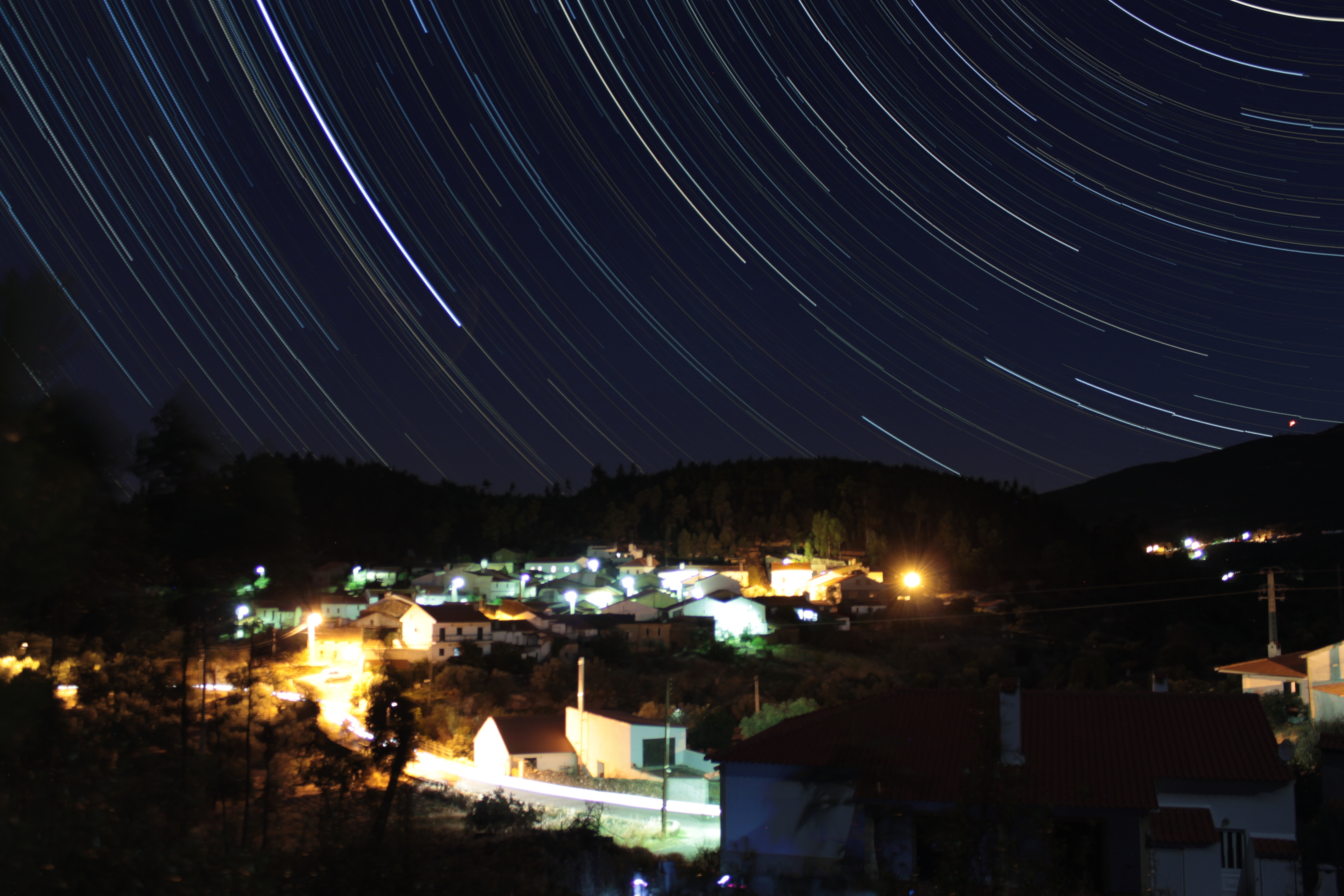 Sobreposição de fotografias, tiradas a partir do Outeiro Agudo, que formam um rasto de estrelas sobre o Caratão.